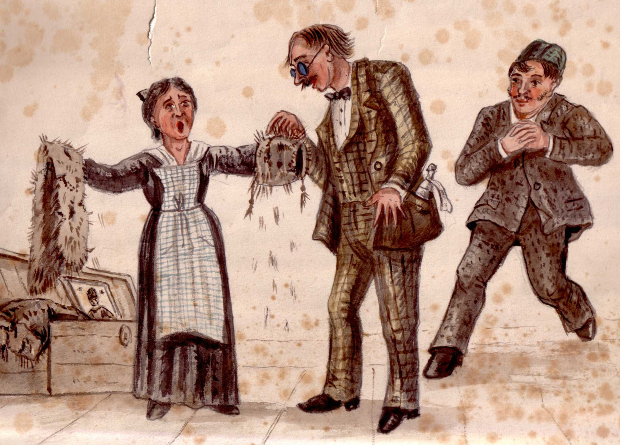 Von einem österreichischen Maler namens Julius Völser, der in der Zeit 1865-1907 eine große Anzahl von Ansichten und figuralen Szenen aus dem Landleben schuf, teilweise vielleicht von Postkartenmotiven beeinflusst. Sein Stil ist einfach und zeichnet sich durch eine besonders detailgetreue Wiedergabe von kleinen Einzelheiten aus. Der zerstörte Pelz. (Beigefügter Verkaufs-Angebotstext). Abgebildet eine Hausfrau, die Ihrem Mann?, dem Apotheker? (s. Medizinflasche im Jackett) jammernd die von Mottenlarven zerfallenden Pelze zeigt, die abgebissenen Haare rieseln nur so vom Muff und Fellschal. Im Hintergrund der maghrebinisch ausschauende, herbeieilende Kürschner, der sich in Anbetracht der zu erwartenden großen Reparatur (oder eines Neuverkaufs...?) schon mal die Hände reibt.